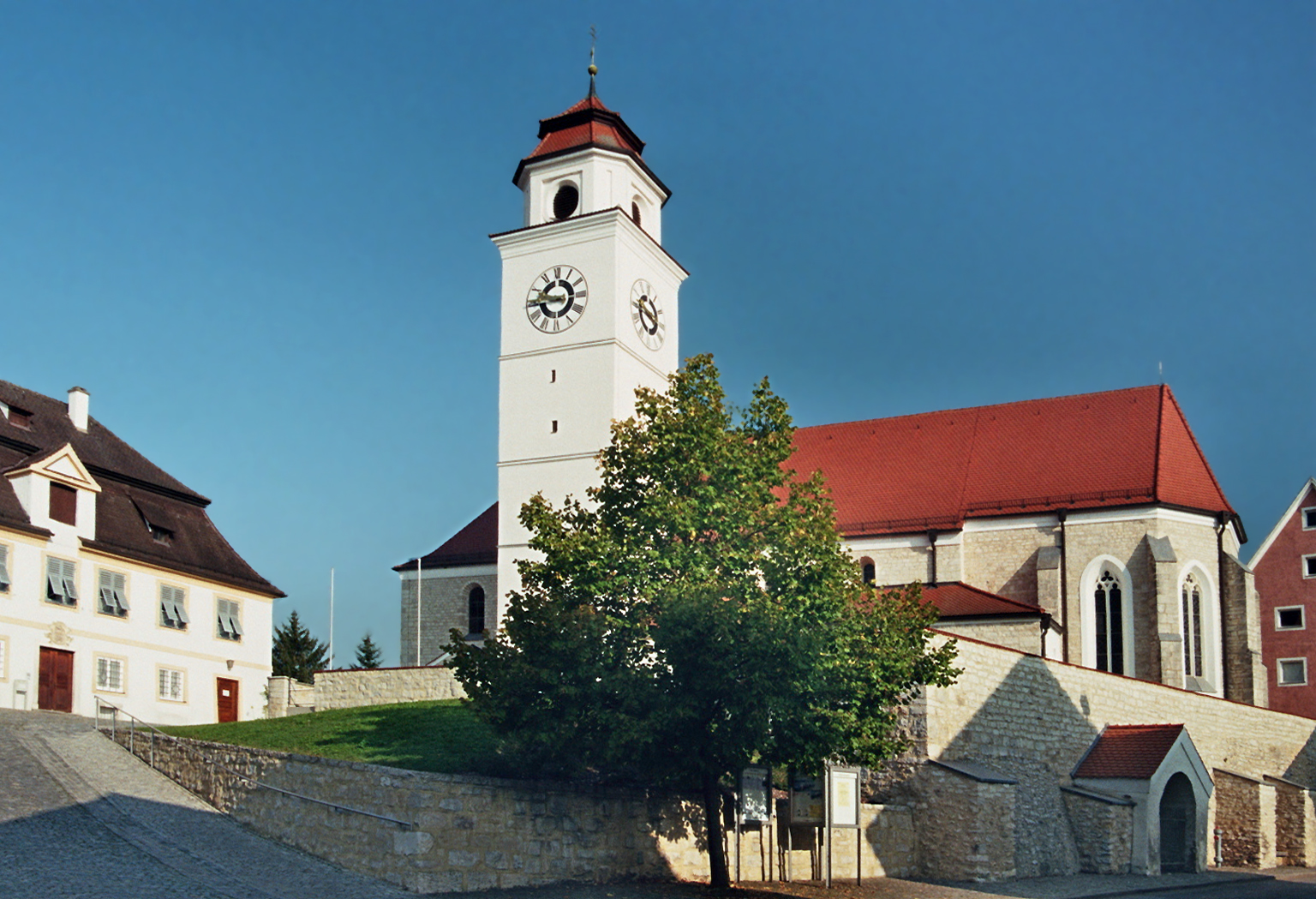 Dollnstein, Altmühltal, Bayern: Marktzentrum mit Pfarrhaus (l.) und Kirche.